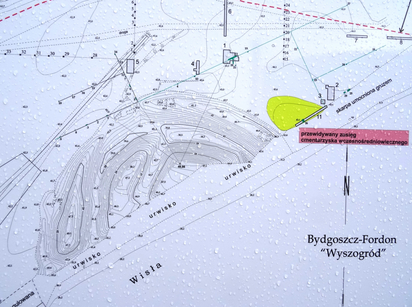 Tablice informacyjne na grodzisku Wyszogród (XI w.) w Bydgoszczy, ustawione w 2015 roku